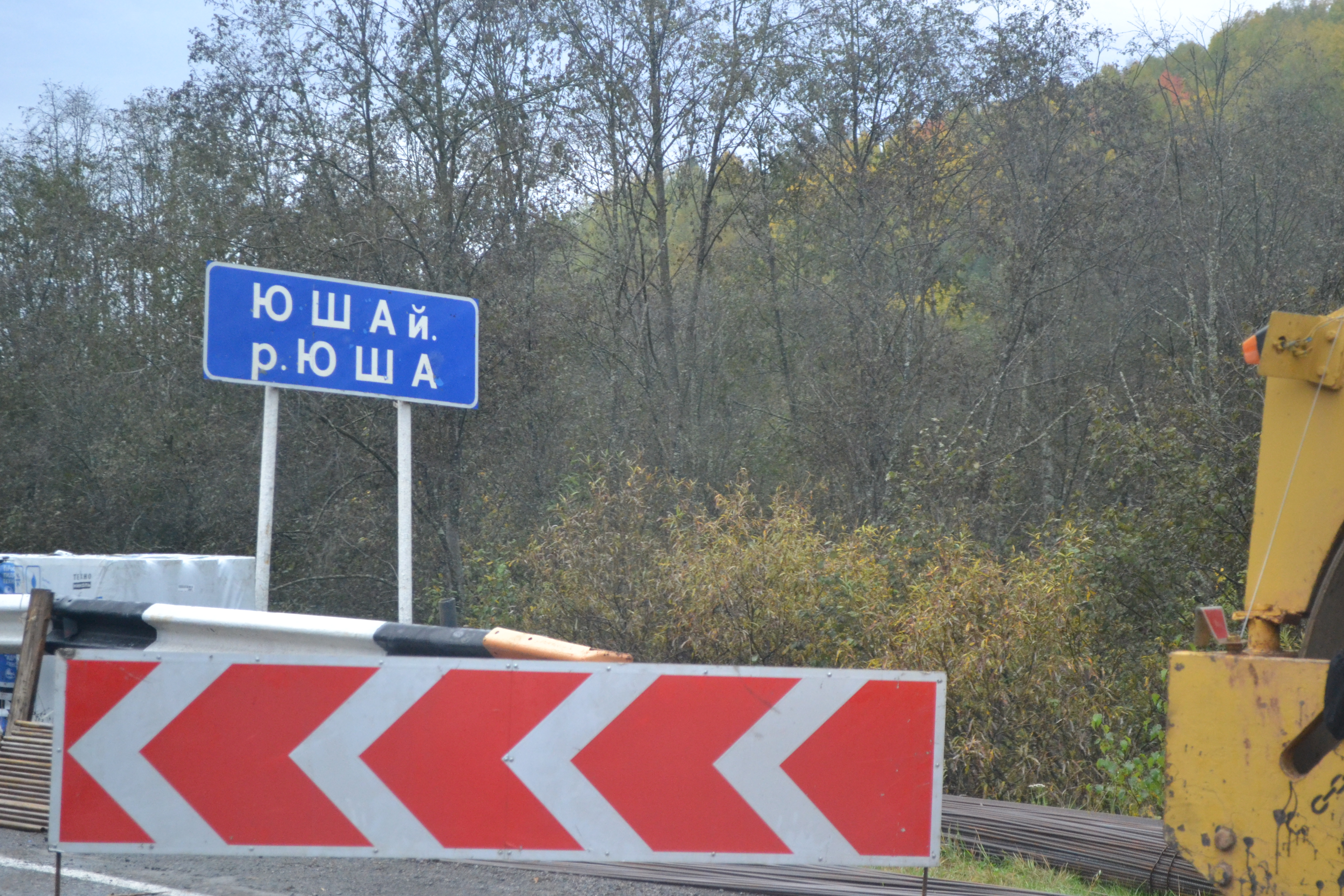 Автомобильный мост через реку Юша в Башкирии, Россия